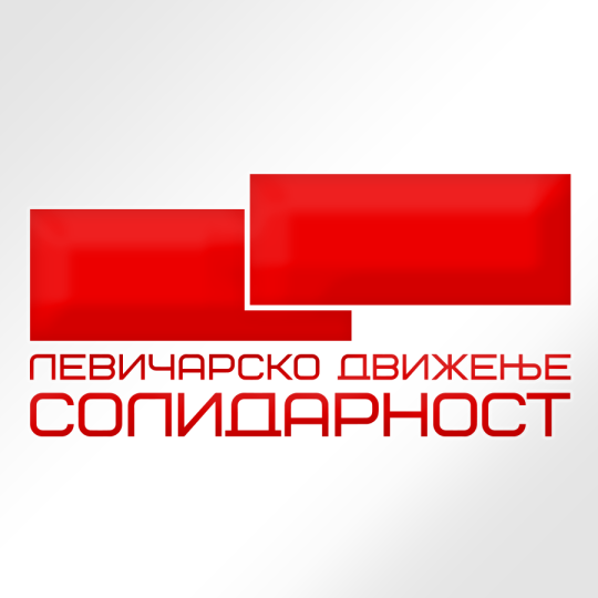 лого на лдс